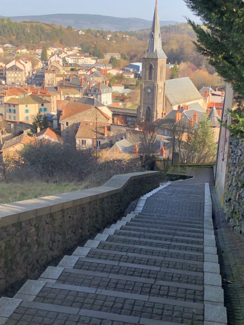 Chemin des Chèvres, Saint-Flour